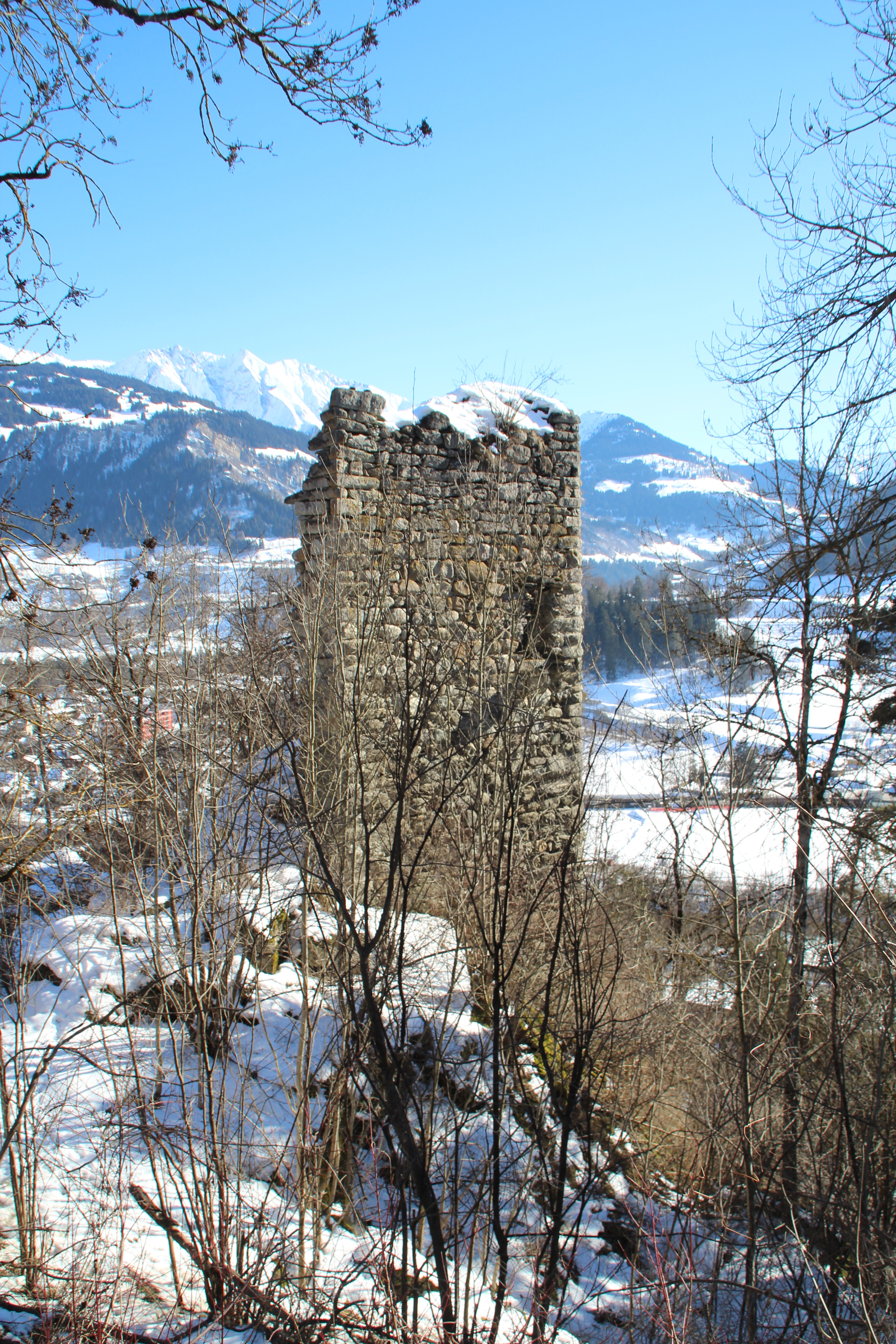 Grüneck Februar 2015, Blick nach Norden